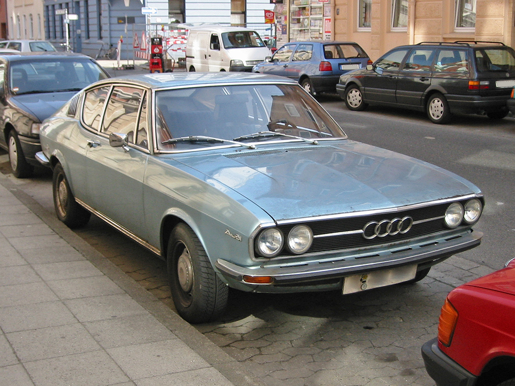 Audi 100 Coupé S